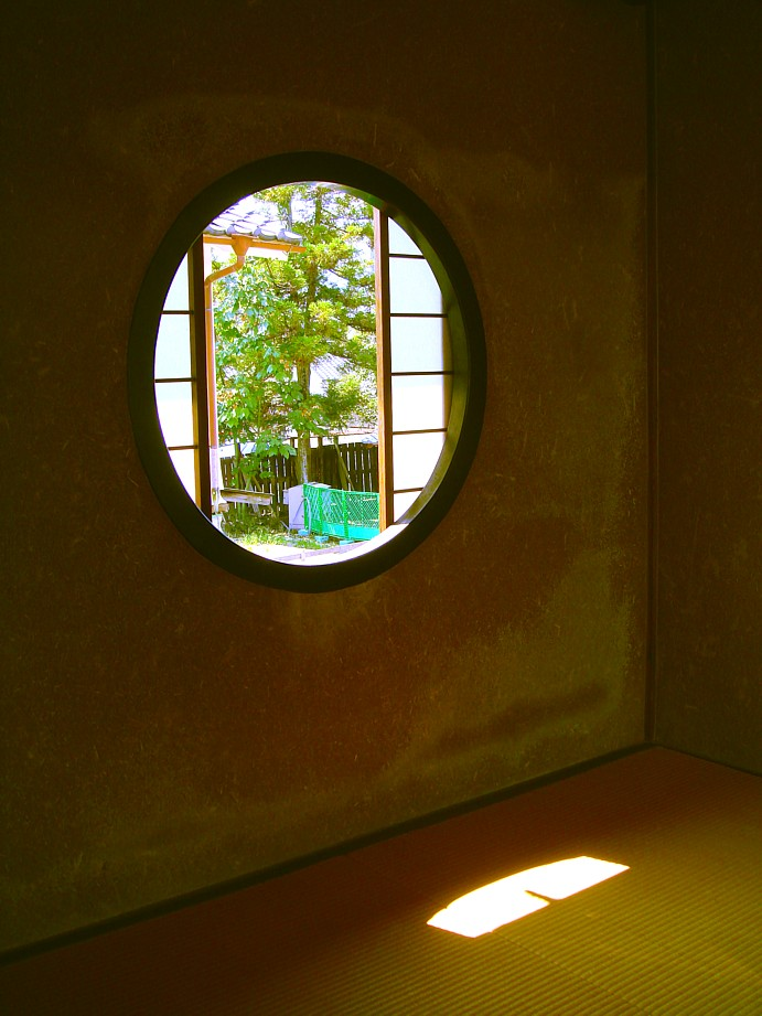 大分県日田市にあった19世紀前後から末期にかけてあった私塾「咸宜園」の現存建築「遠思楼」の丸窓。